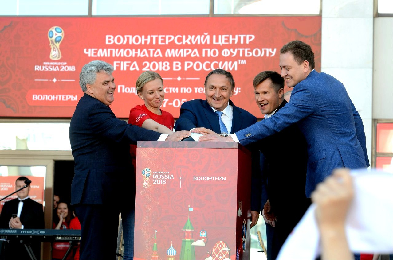 Старт регистрации волонтеров ЧМ-2018 в Саранске